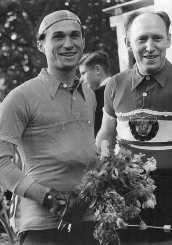 Werner Weber Illus DS Leu-Ho 5.10.1951 "Friedensfahrt der Nationen" durch die DDR vom 3.-14. Oktober 1951. - 2. Etappe Stralsund-Schwerin UBz: Links: Der Sieger der 1. Etappe Berlin-Stralsund, der Chemnitzer Werner Weber (SV Motor I) Leihweise Illus Berlin WS